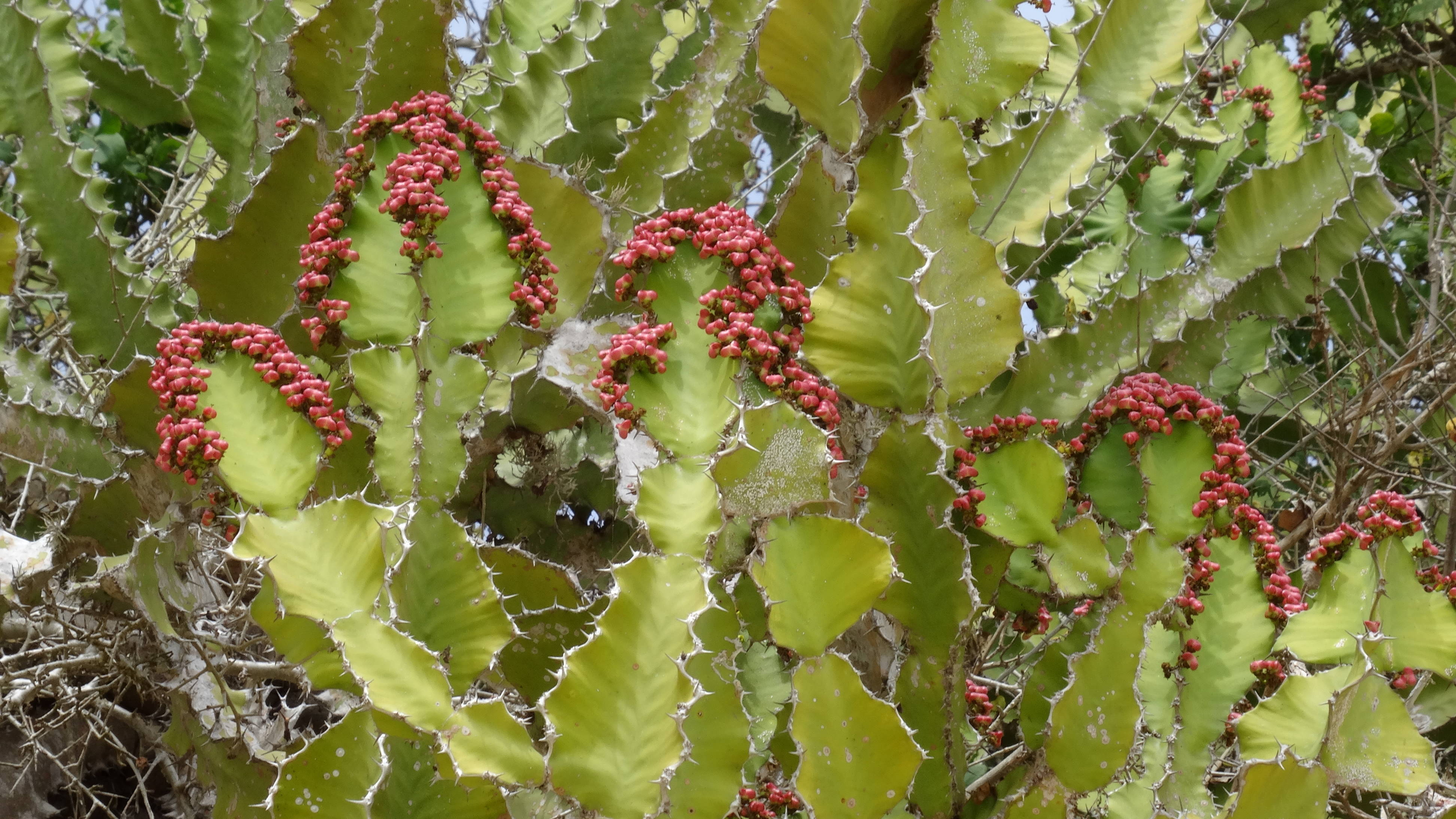 Euphorbia halipedicola - Mossuril